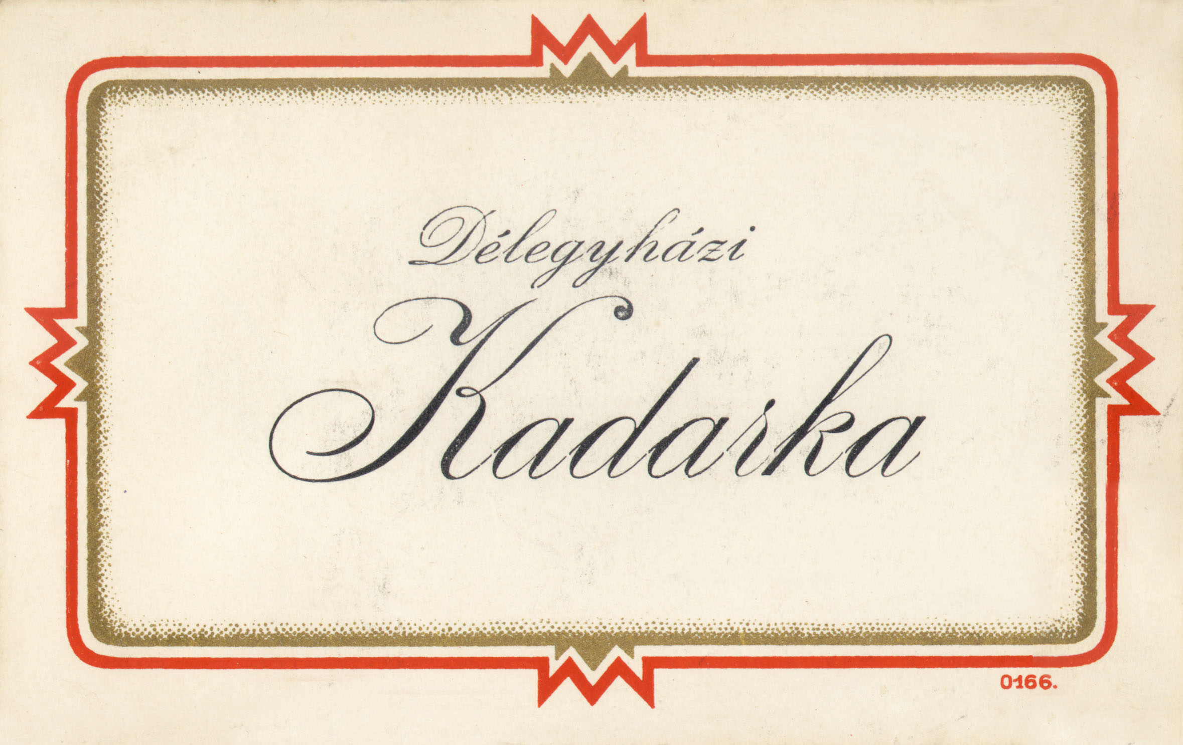 Délegyházi kadarka címkéje az 1920-as évekből.